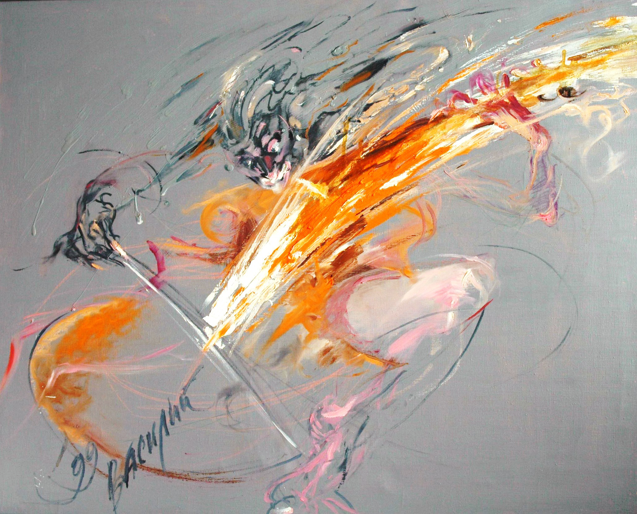 ВИОЛОНЧЕЛИСТКА. Холст, масло, 100Х80 см. 1999 г